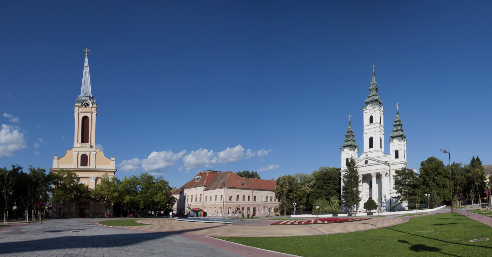 Трг Ослобођења - панорамна фотографија